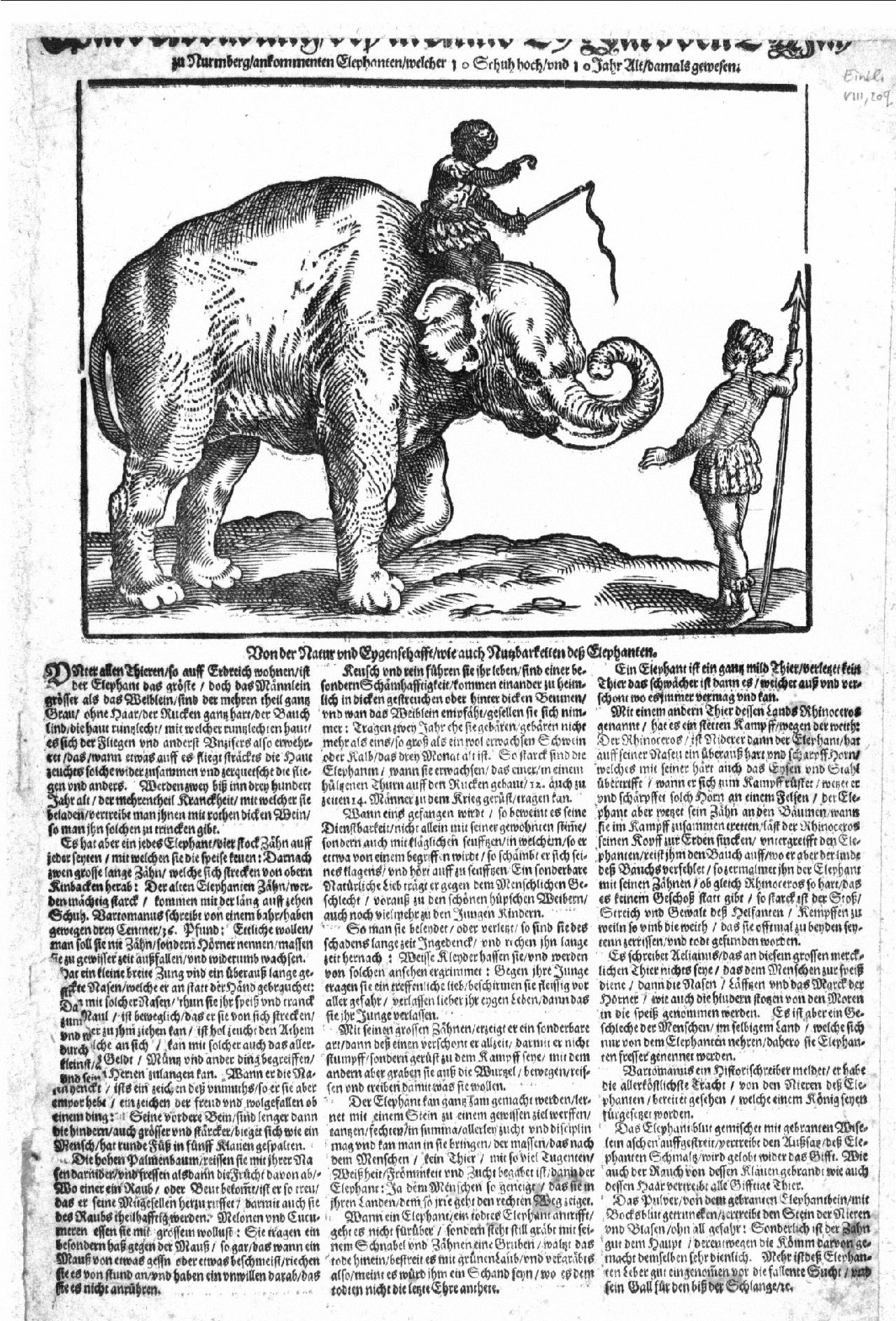 Flugschrift mit Darstellung eines Elefanten